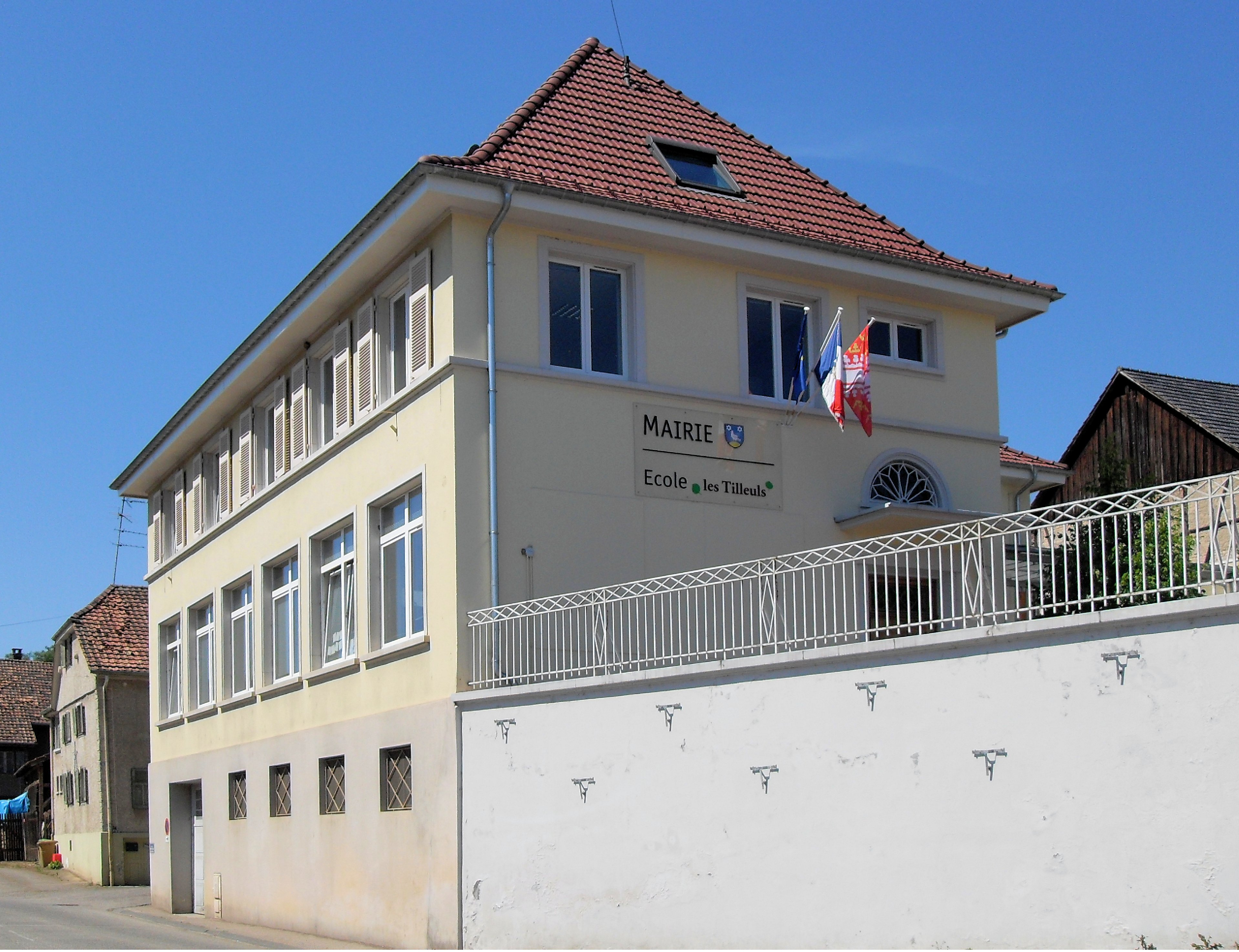 La mairie-école de Buschwiller